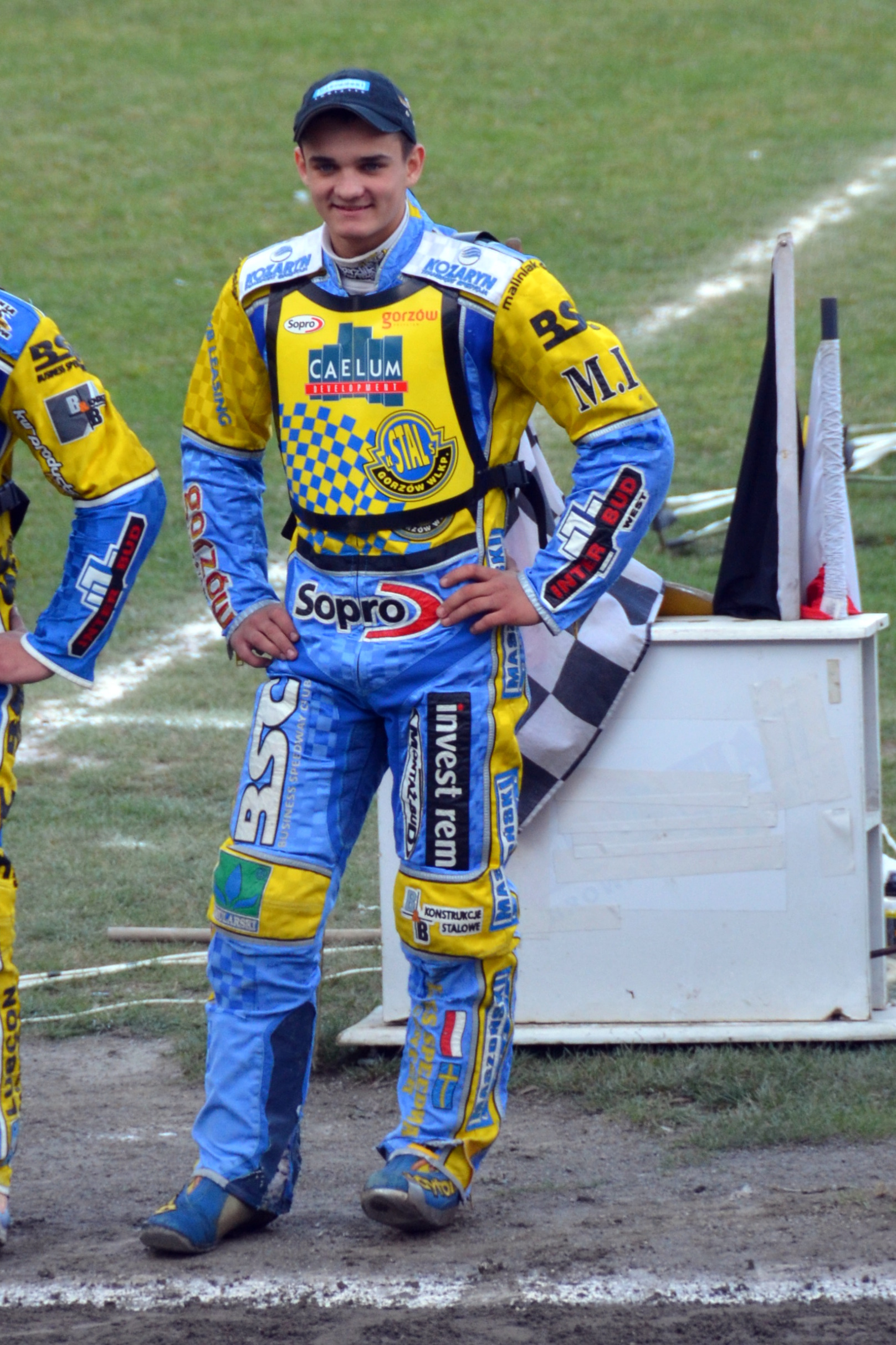 Bartosz Zmarzlik podczas finału MDMP w Bydgoszczy, 22 września 2011 roku